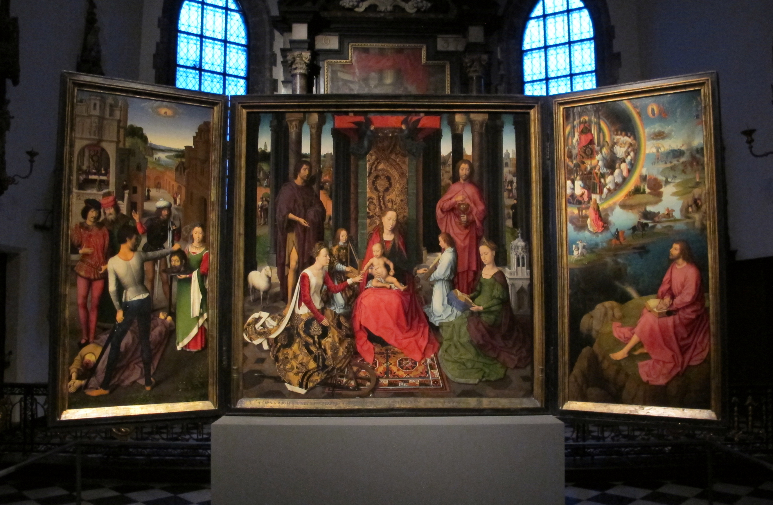 Hans memling, trittico di san gacomo